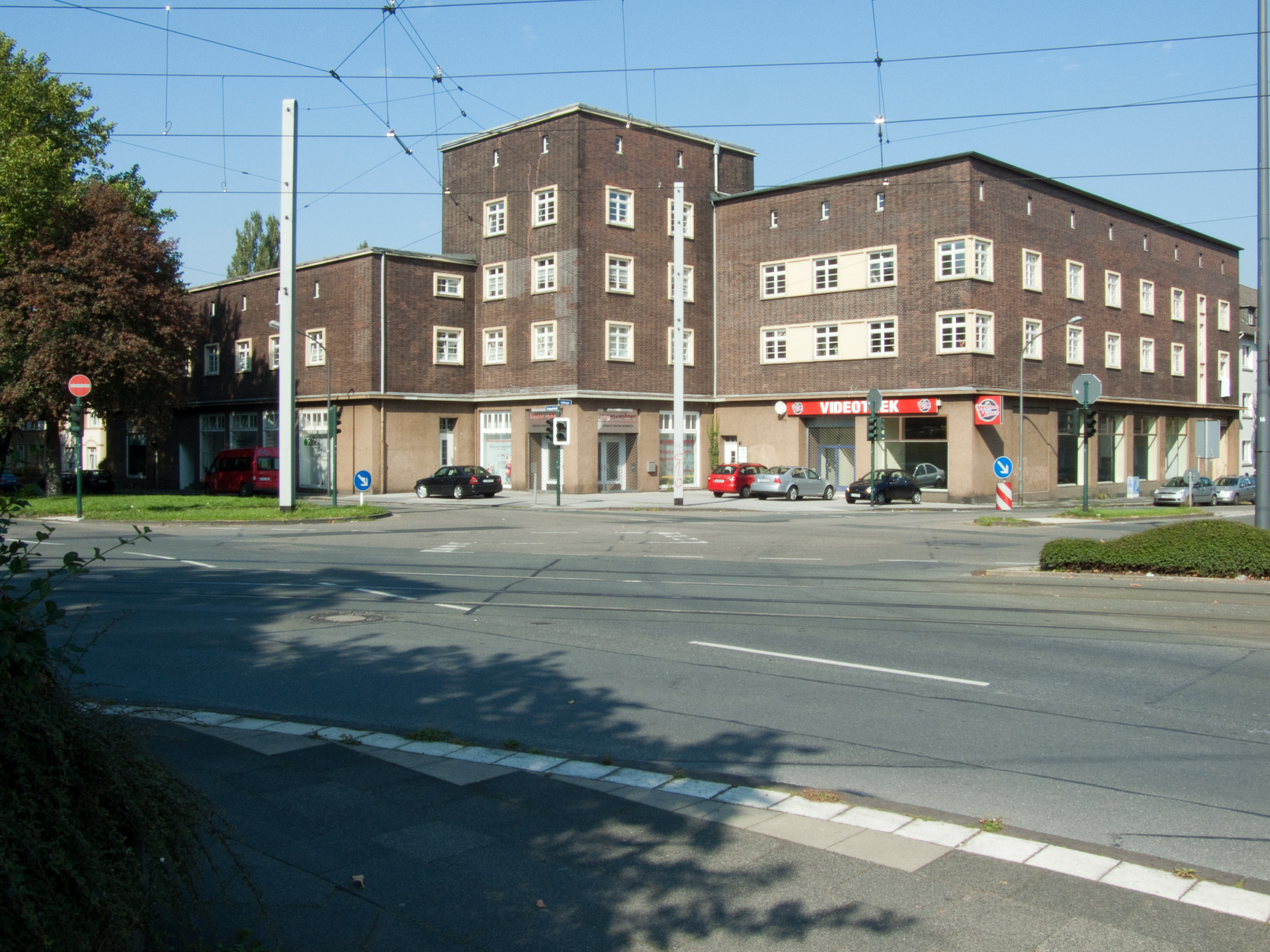 Ehemalige Krupp’sche Konsumanstalt, Leimgardtsfeld 24–28 / Stolbergstraße 67. Denkmal Nr. 622 in der Liste der Baudenkmäler der Stadt Essen, Essen-Bergeborbeck, Stadtbezirk IV, in Nordrhein-Westfalen.